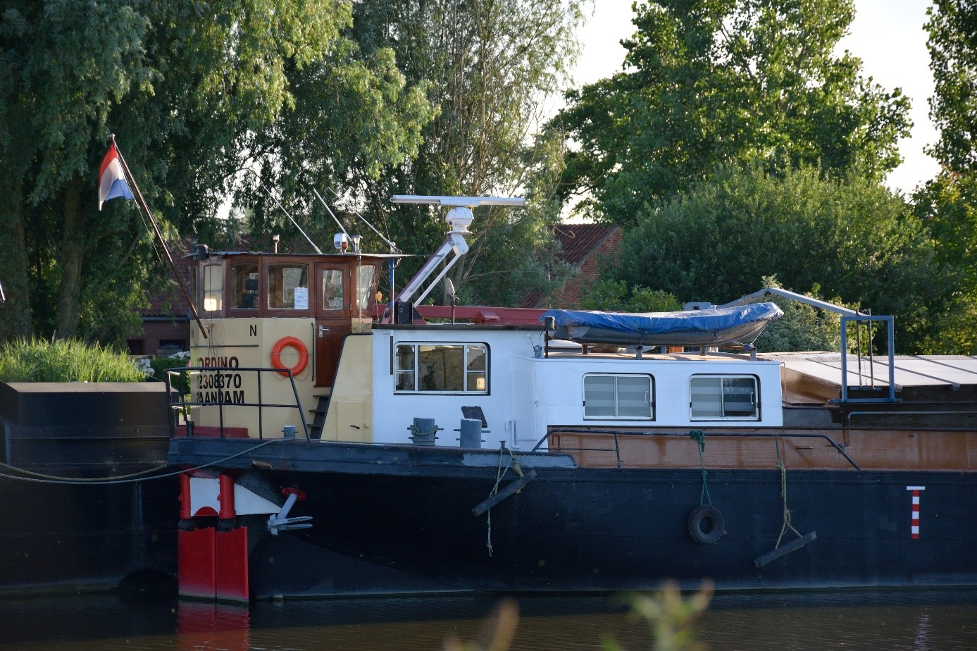 Museumschip Tordino te Beernem in 2018